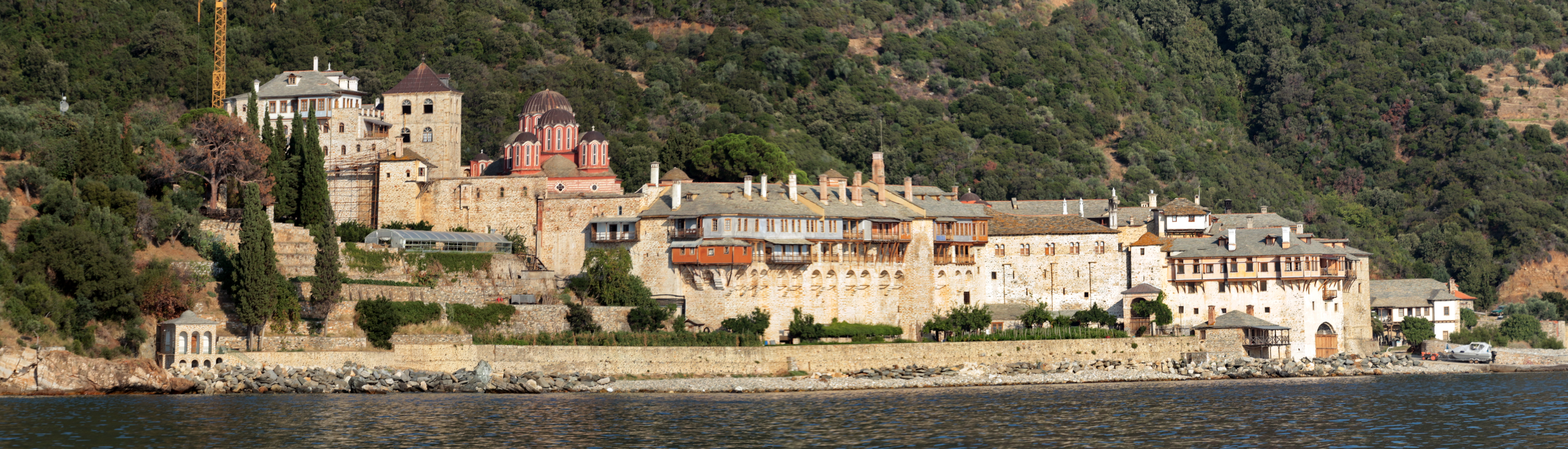 manastir Ksenofont, Sveta gora, zapadna strana